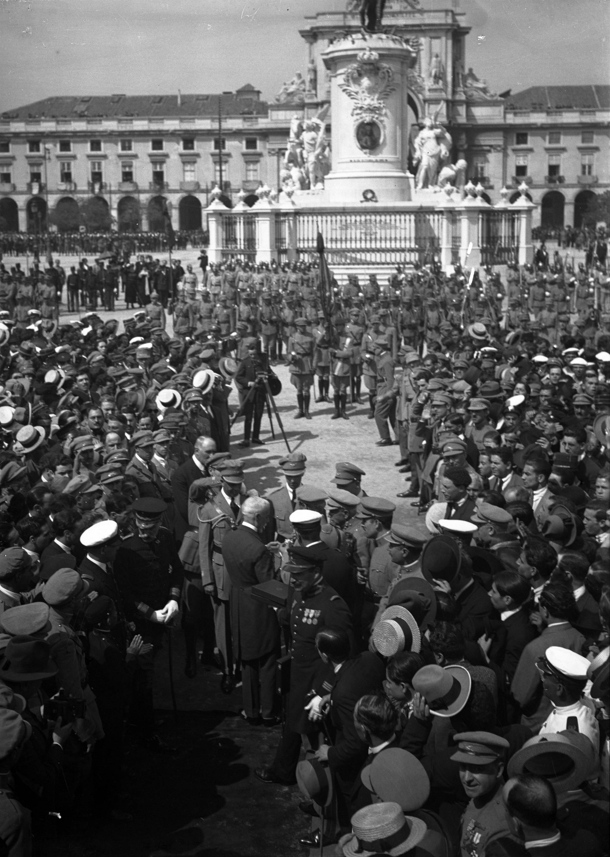 Título: Recepção aos aviadores do avião Pátria, Brito Pais, Sarmento de Beires e Manuel Gouveia, que fizeram a ligação Lisboa-Macau Dimensão: 9 x 12 cm Suporte: Negativo de gelatina e prata em vidro Notas: Inscrição no original: 7707 Assunto: Homenagem / Terreiro do Paço (arcada, Santa Maria Maior, Lisboa, Portugal) / Monumento / José I. 1714-1777, rei de Portugal / Comércio (praça, Santa Maria Maior, Lisboa, Portugal) Código de referência: PT/AMLSB/JBN/001440